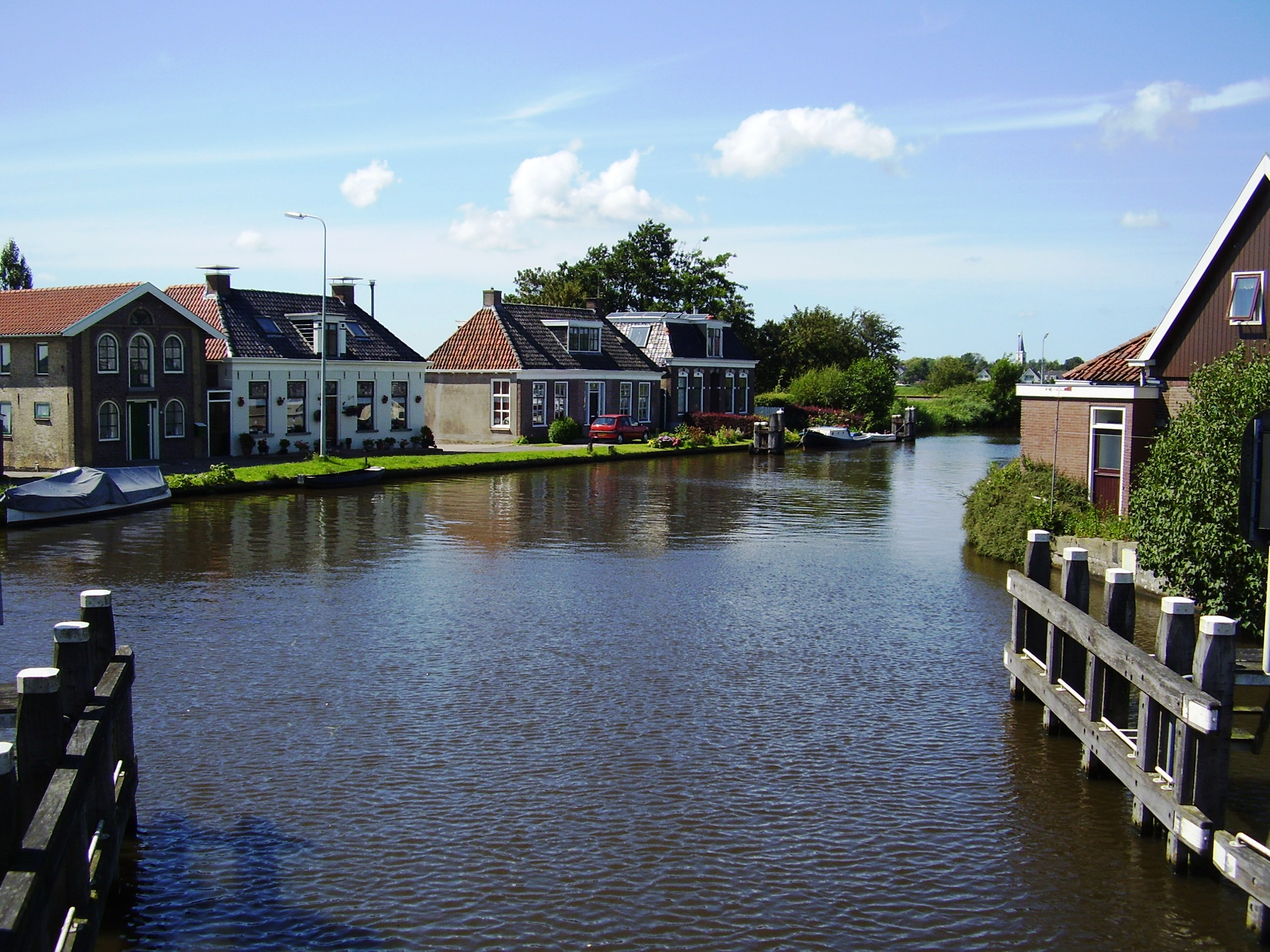 De Wijmerts bij Nijezijl in provincie Friesland